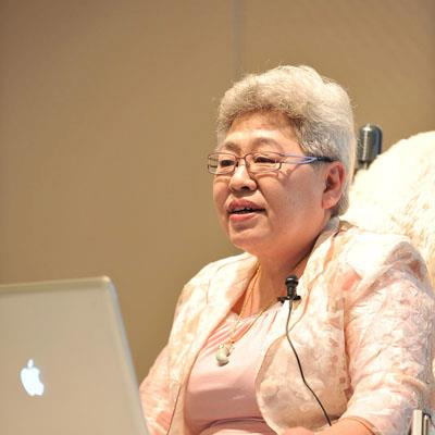 笑顔の連鎖 講演会にて